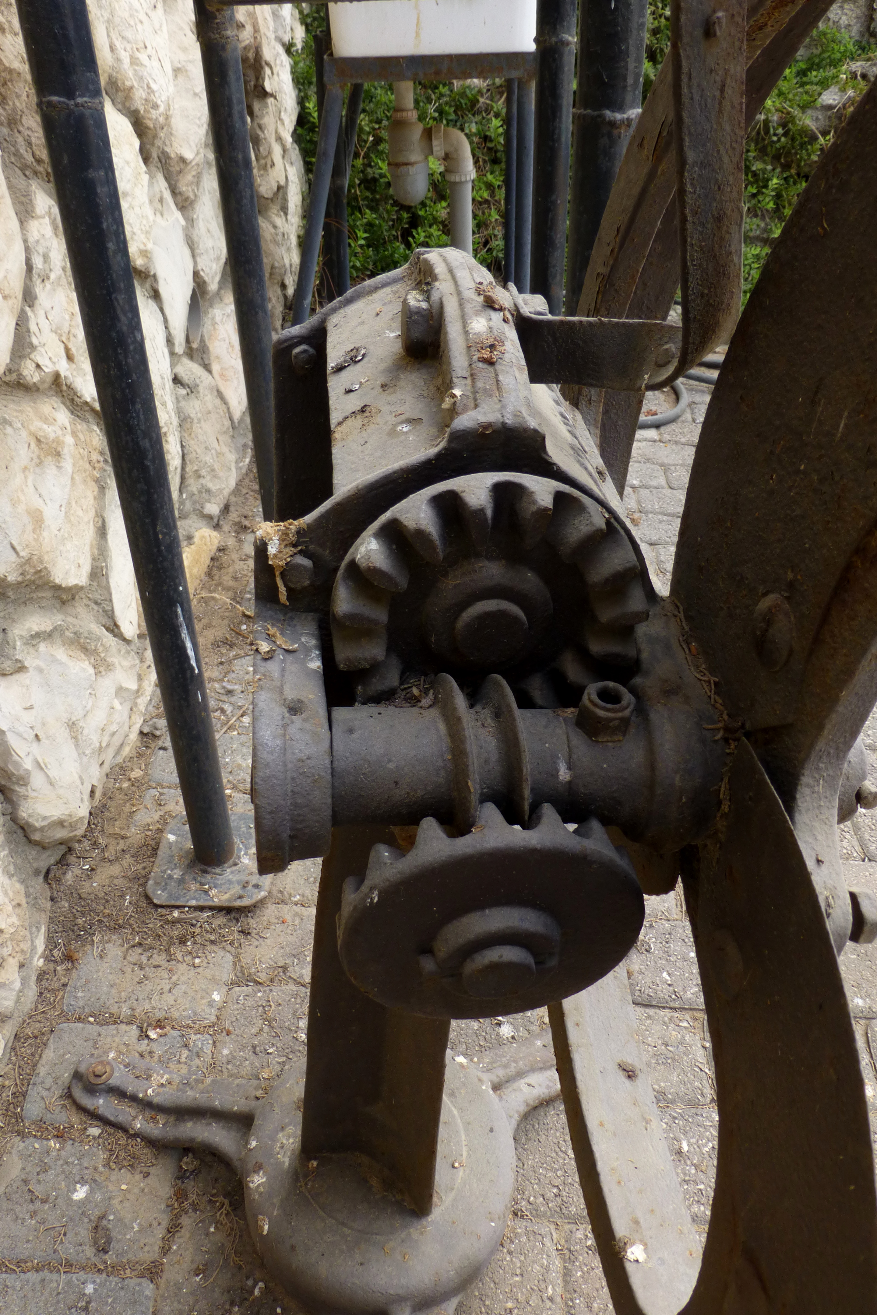 נבנה ב1924, על ידי משה ורחל מינץ. שימש בחלקו המערבי כבית מגורים ובחלקו המזרחי כבית עם. כיום הוא משכנו של מוזיאון לתולדות גדרה והביל"ויים.